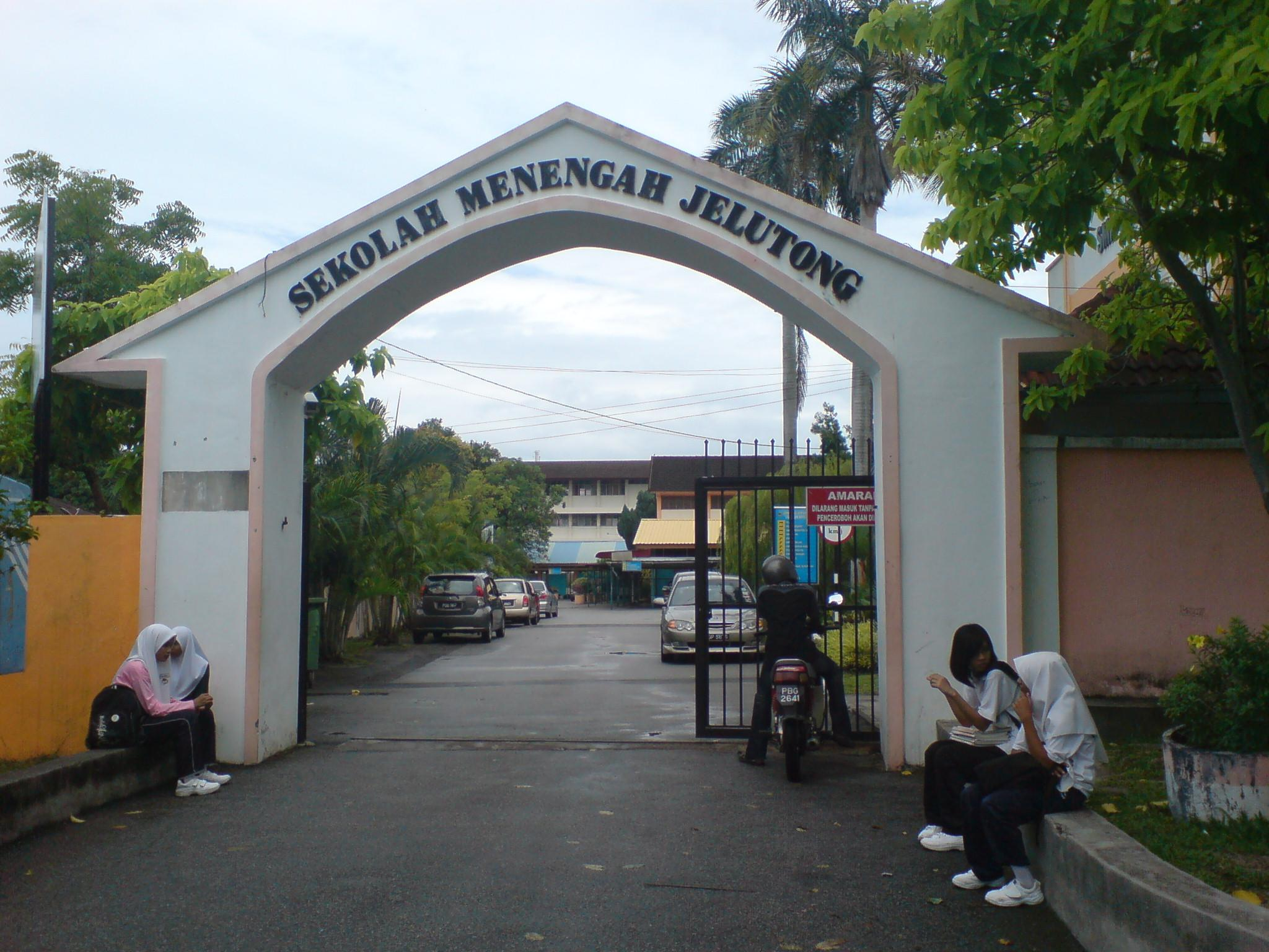 Sekolah Menengah Jelutong